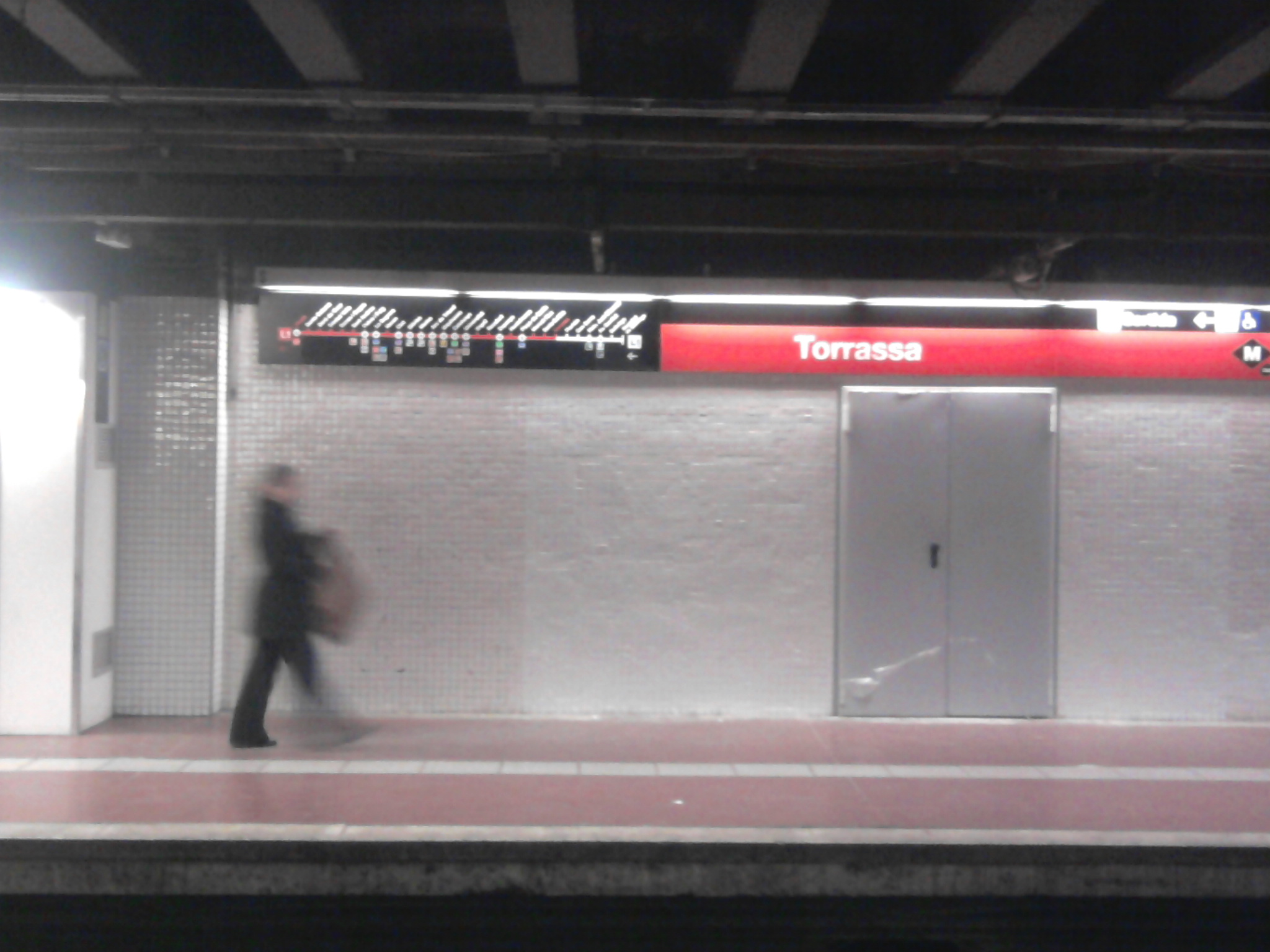 Foto capturada per la meva càmara a l'estació de Torrassa (Metro de Barcelona).